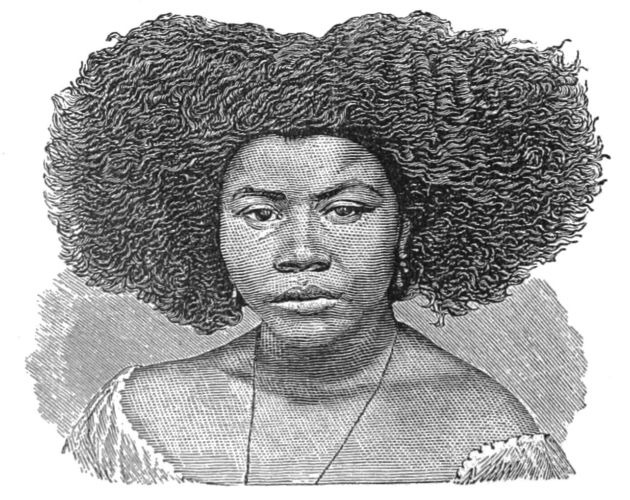 Cafuzo woman